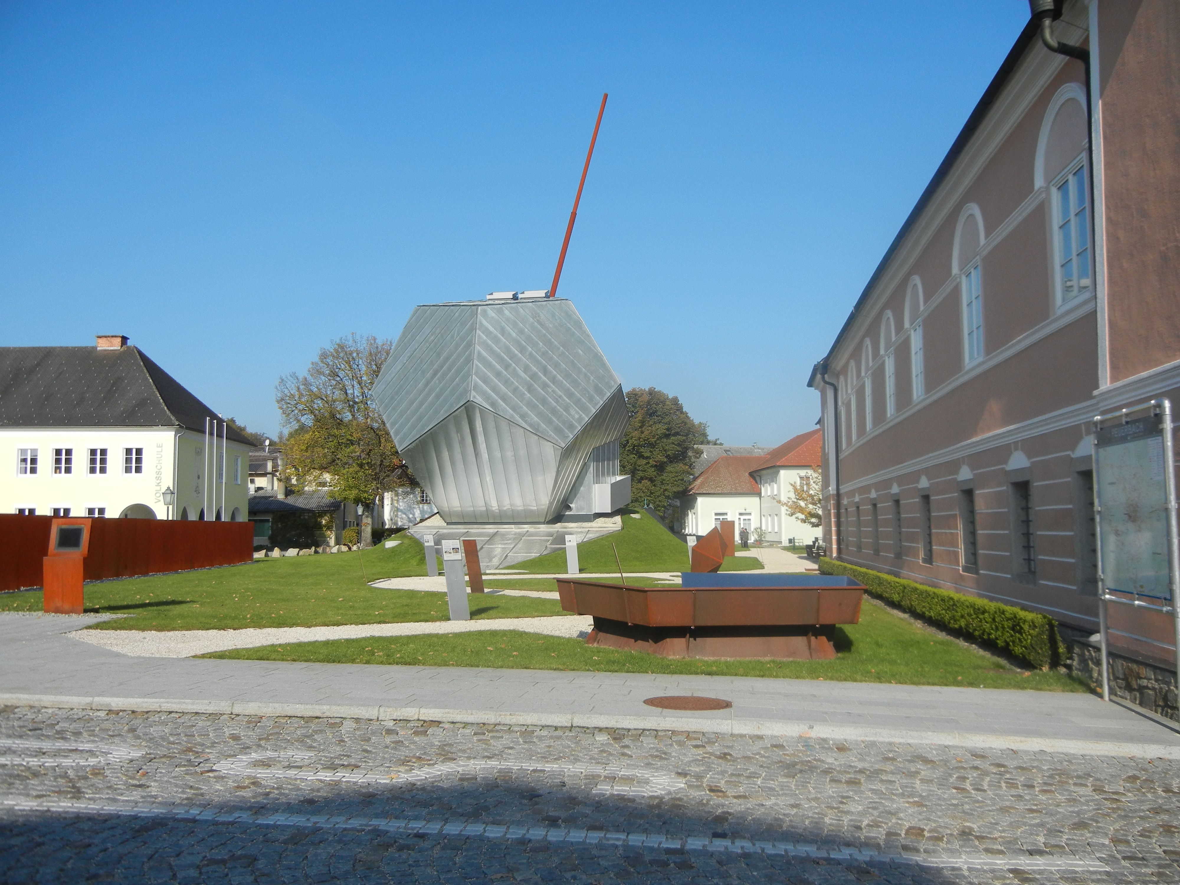 Der Kometor - ein begehbares Himmelskörper-Projekt des Künstlerehepaares Billa und Manfred Hebenstreit - im Schlossgarten von Peuerbach.